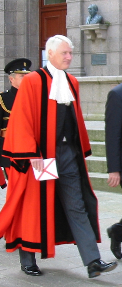 Nrf: Michael Birt, Bailli d'Jèrri (2009 - ), Jour d'la Libéthâtion, Jèrri, 9 d'Mai 2009 (quand i' 'tait acouo Député Bailli). La stchulptuthe du Lord Coutanche, Bailli 1935-1961, est driéthe.